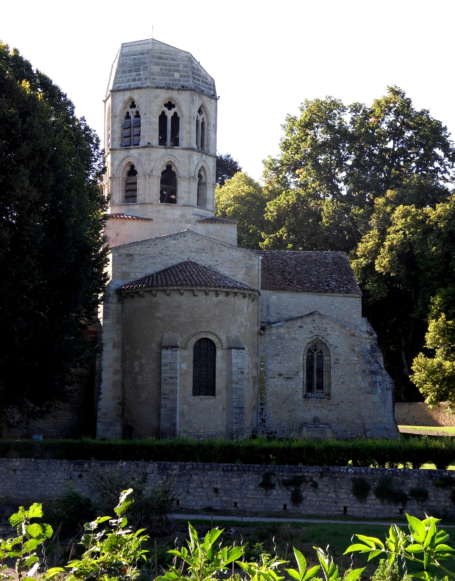 Église Saint-Maurice, (Classé, 1911) .